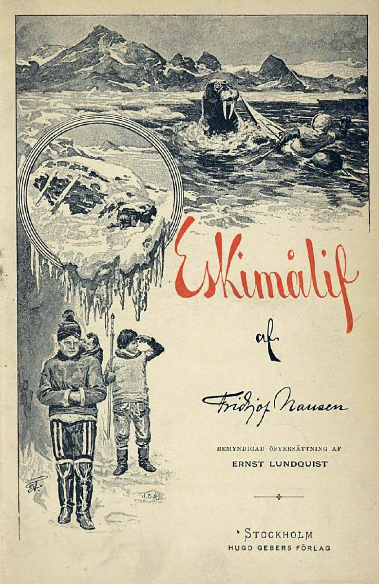 Framsidan till Eskimålif, 1891.